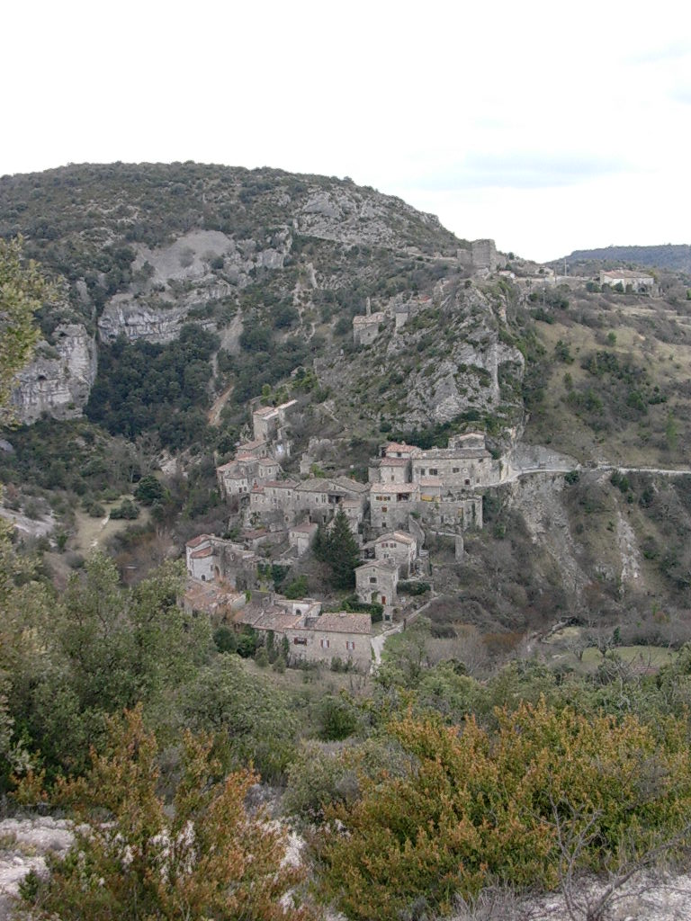 Village de Rochecolombe en Ardèche